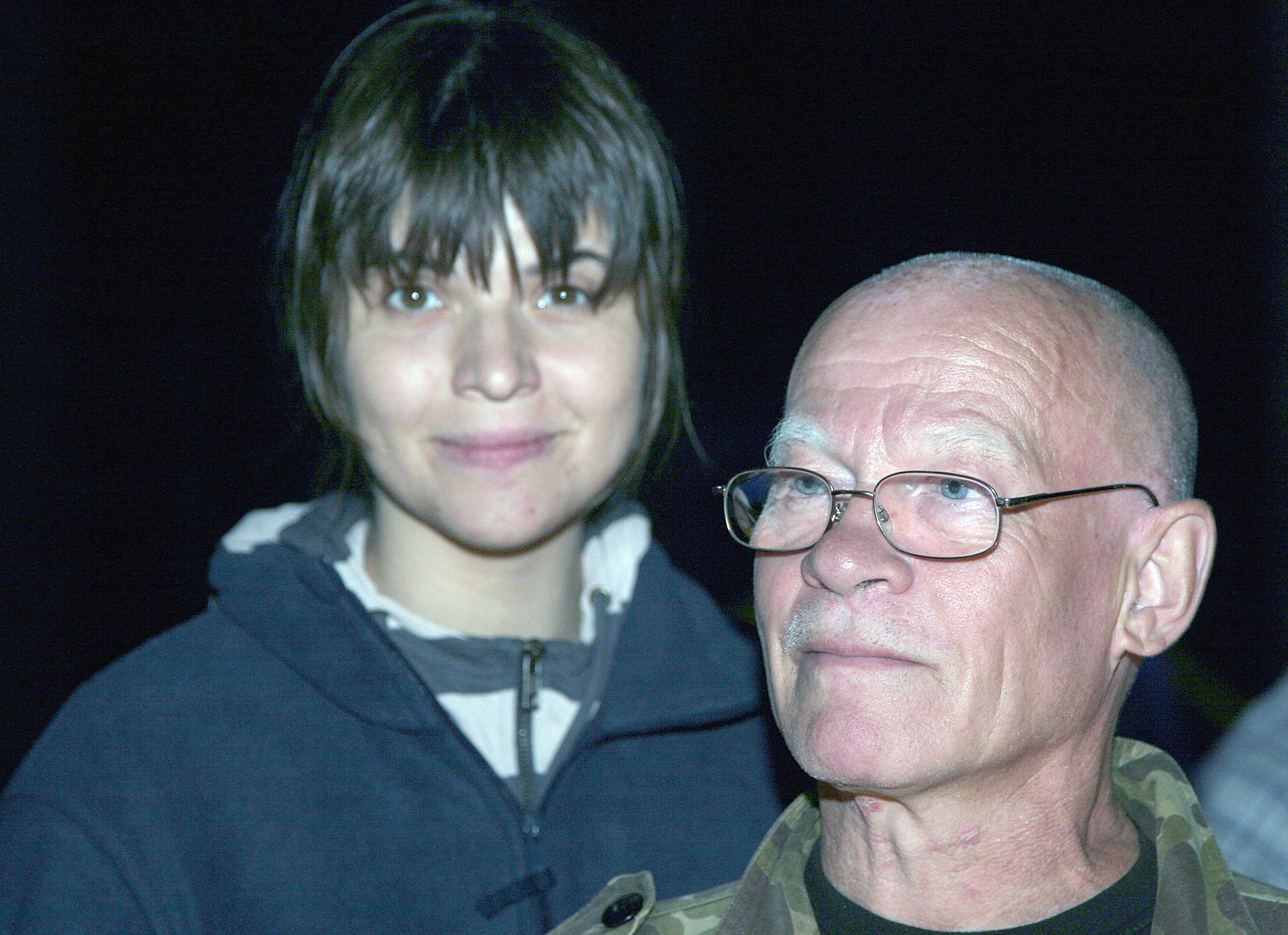 Olga ja Priit Pärn 2007. aastal